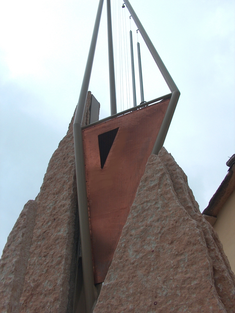 Arpa eolica monumentale presente a Mazzano, frazione di Negrar (VR)